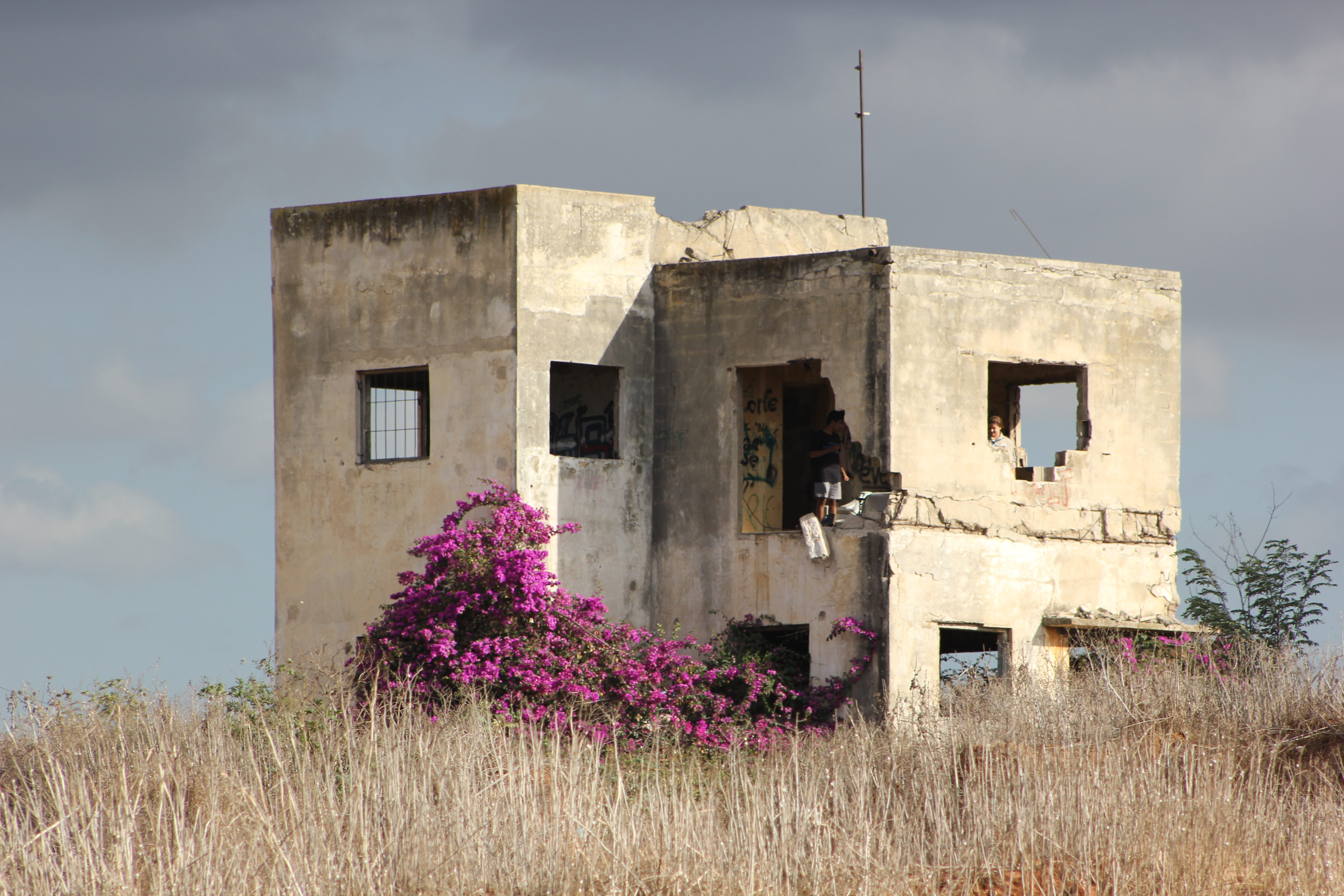 בית המחנה, נבנה ב-1929 ושימש את הפועלים שעבדו בפרדסים. לאחר מכן שימש כבית בטחון ומפקדה של ההגנה.